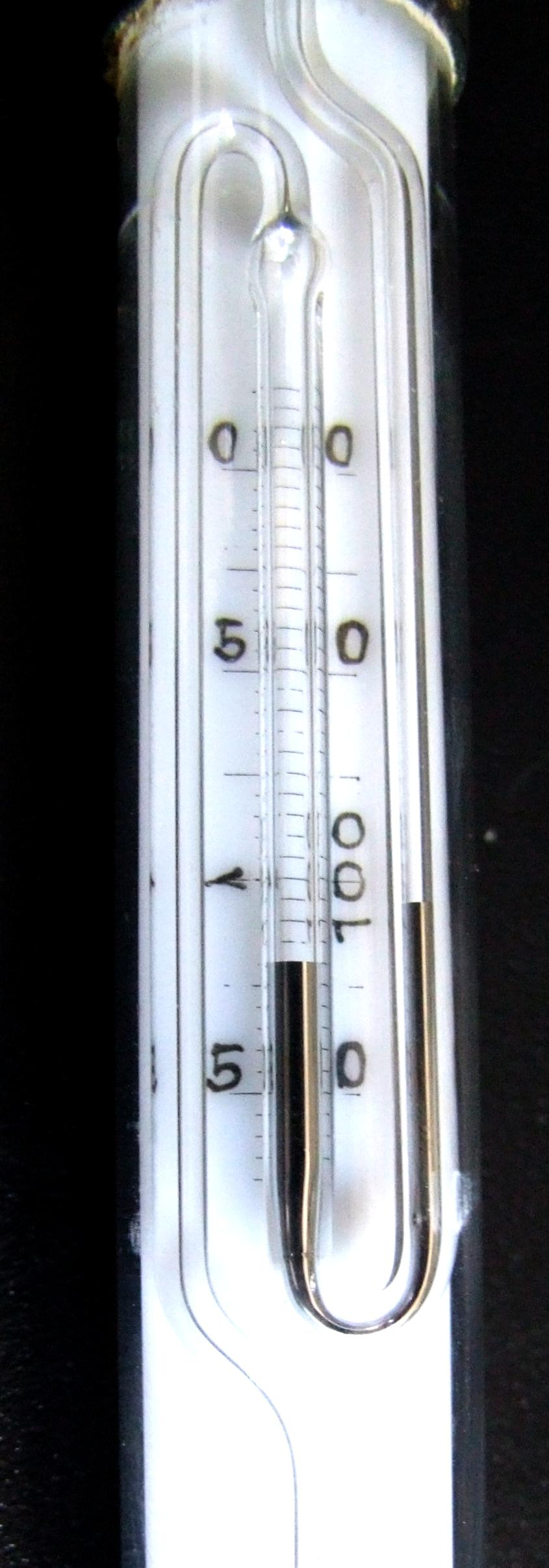 Beckmann-hőmérő póthigany tartálya, Készítette Dubniczky Tibor, Miskolci Egyetem, Kémiai Tanszék